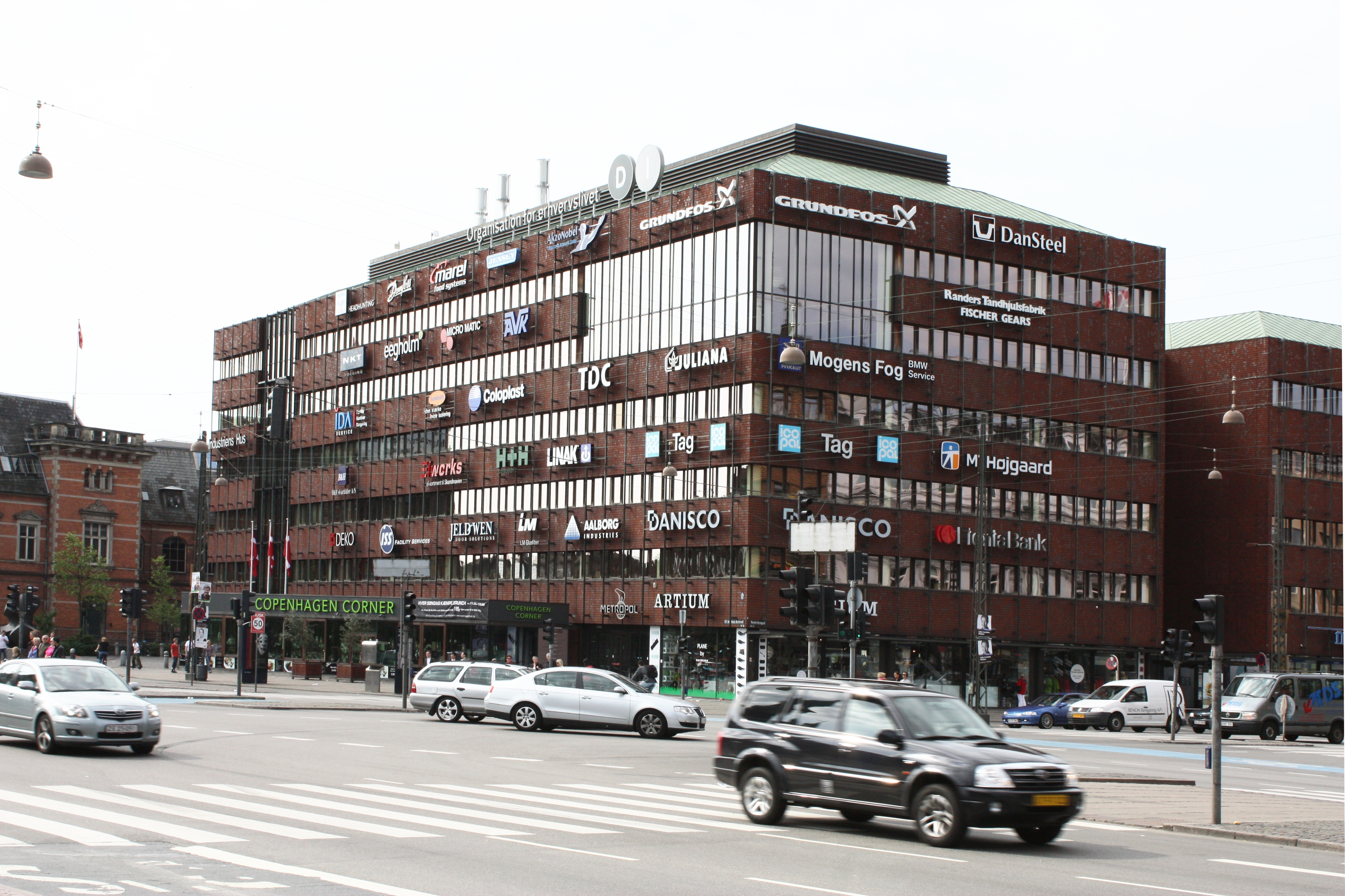 Kopenhagen 2009